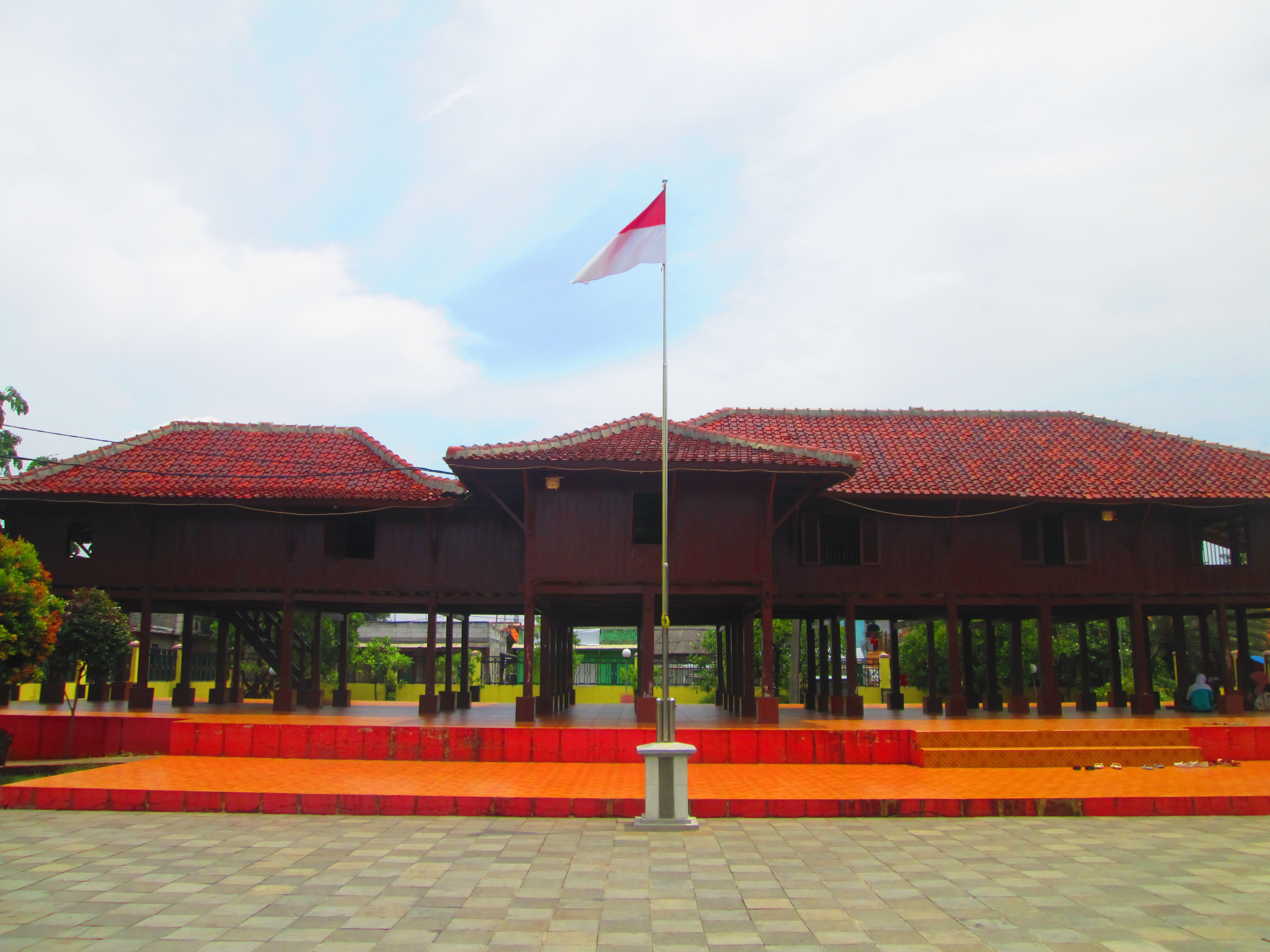 rumah pitung, marunda, cilincing, Jakarta Utara.